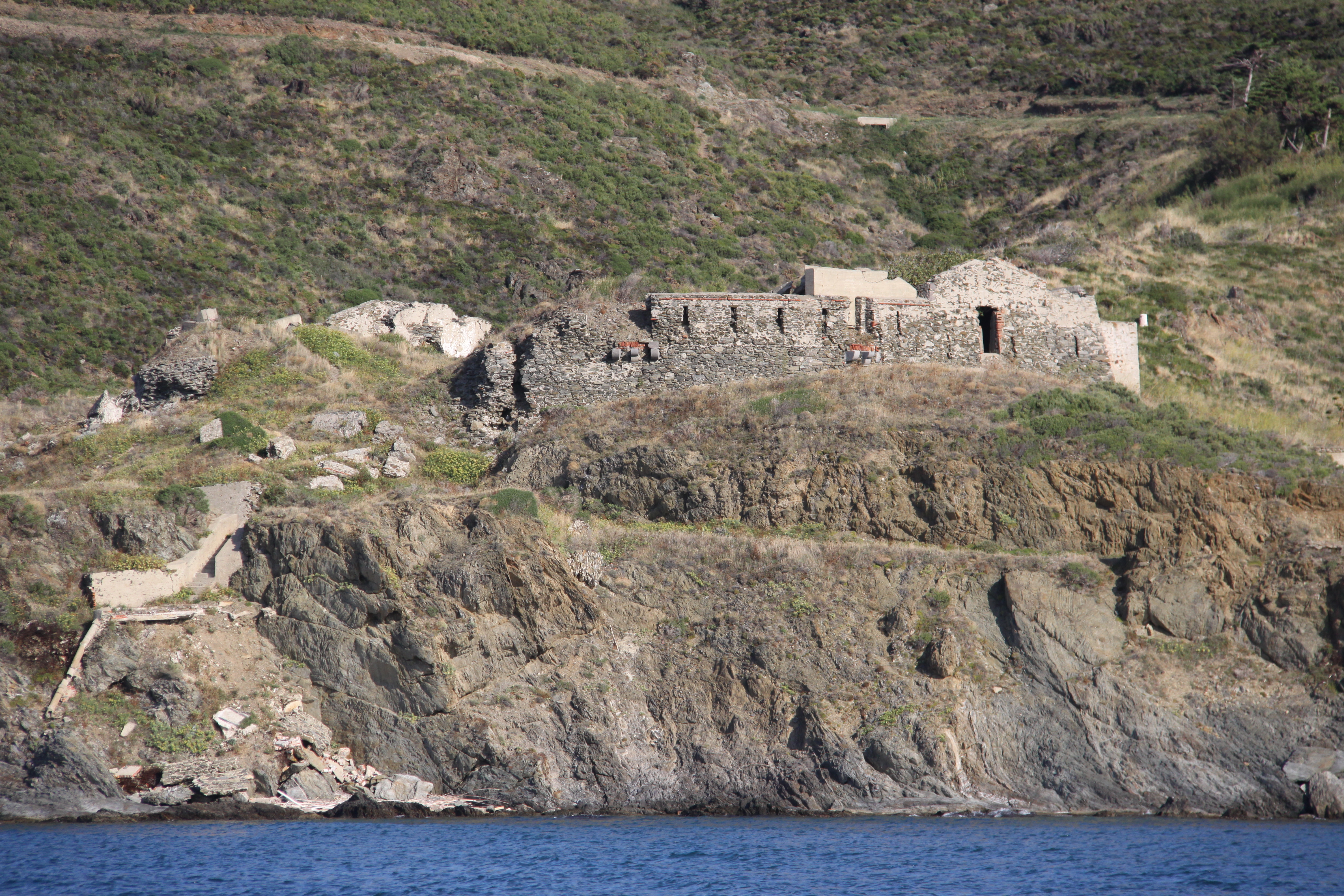 La Redoute de Mailly à Port-Vendres (fin 18ème siècle). Inscrit Monument Historique en 1991. PA00104187. Port-Vendres, Pyrénées-Orientales, France. .